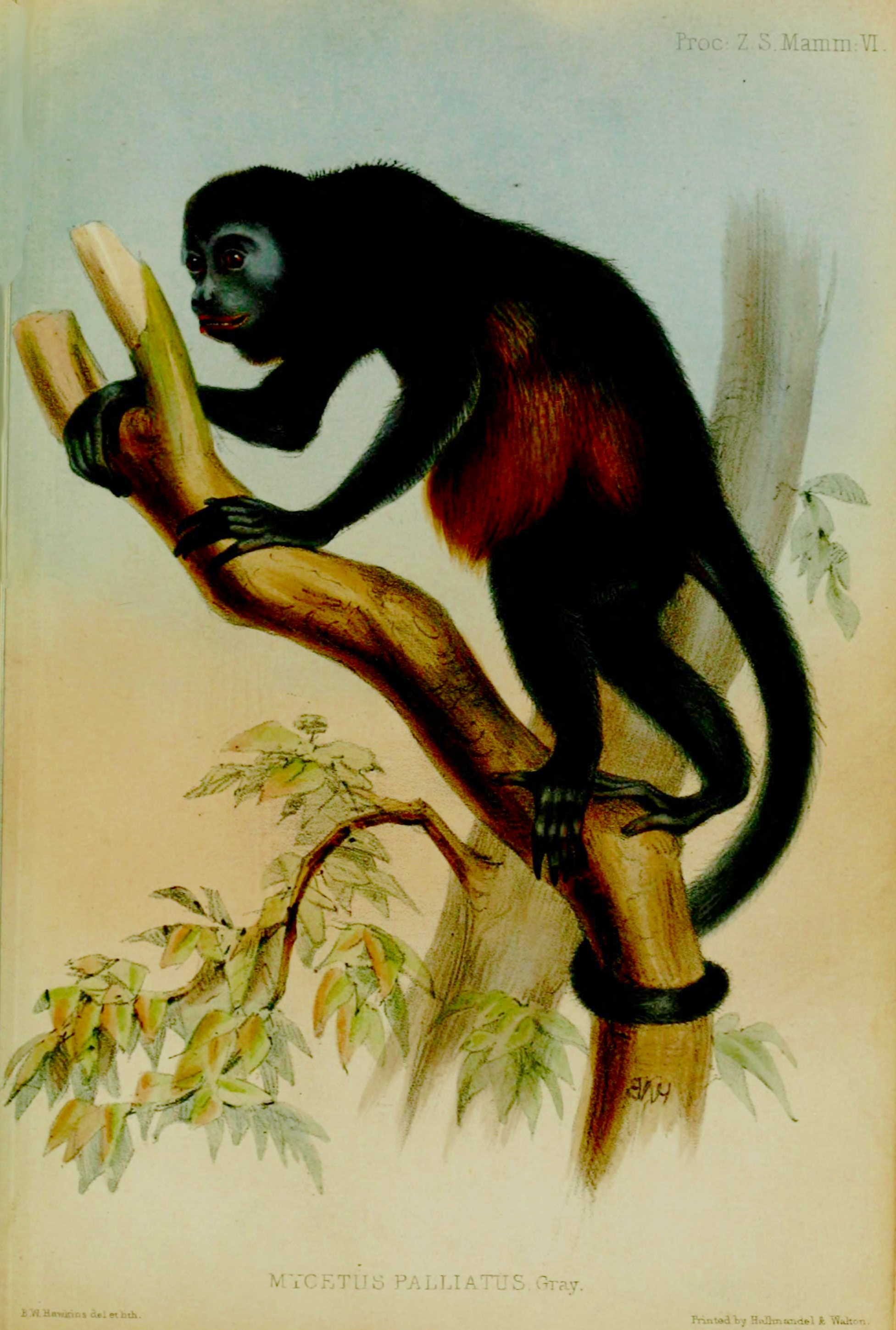 Mycetus palliatus